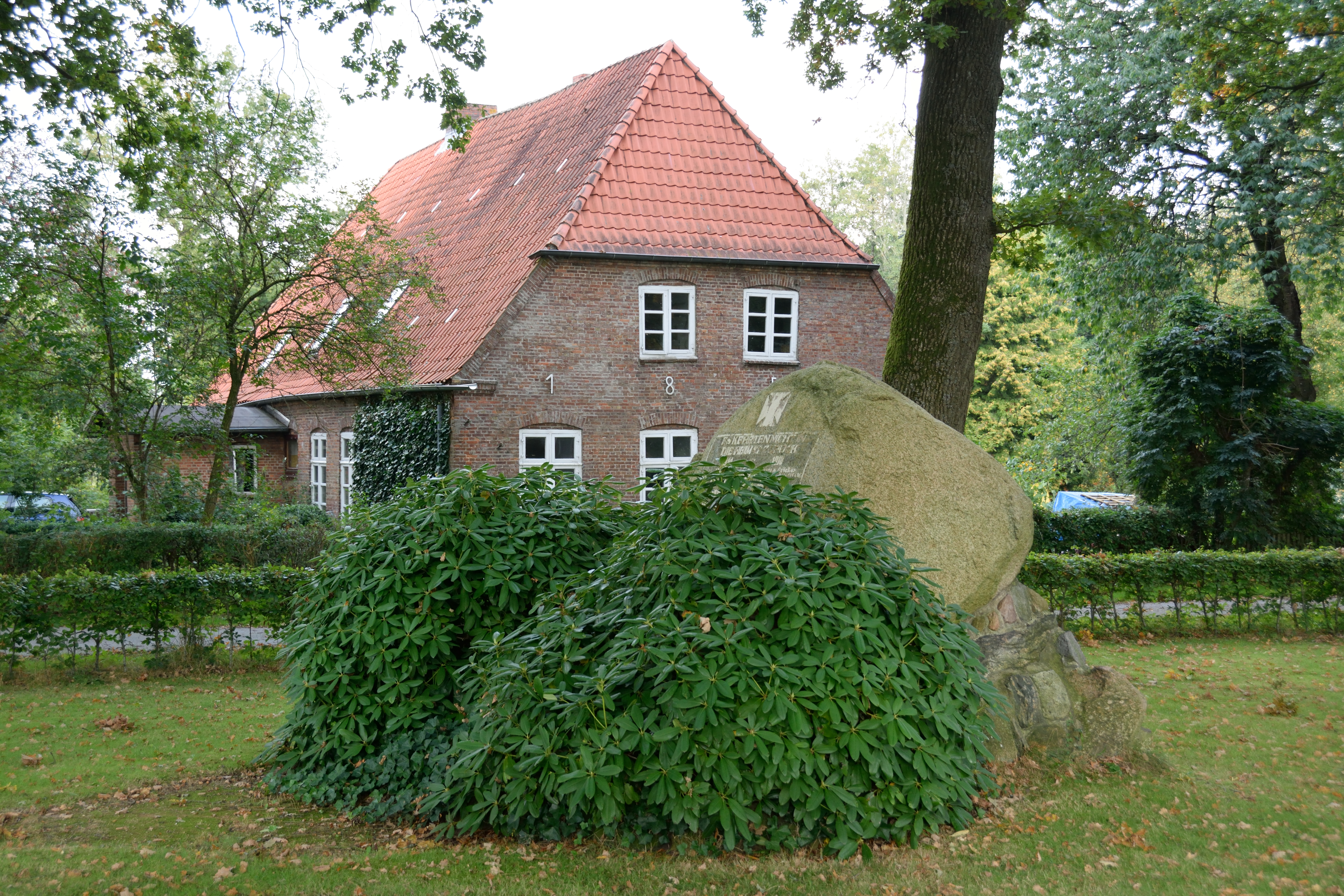 Ehrenmal in Oldenborstel